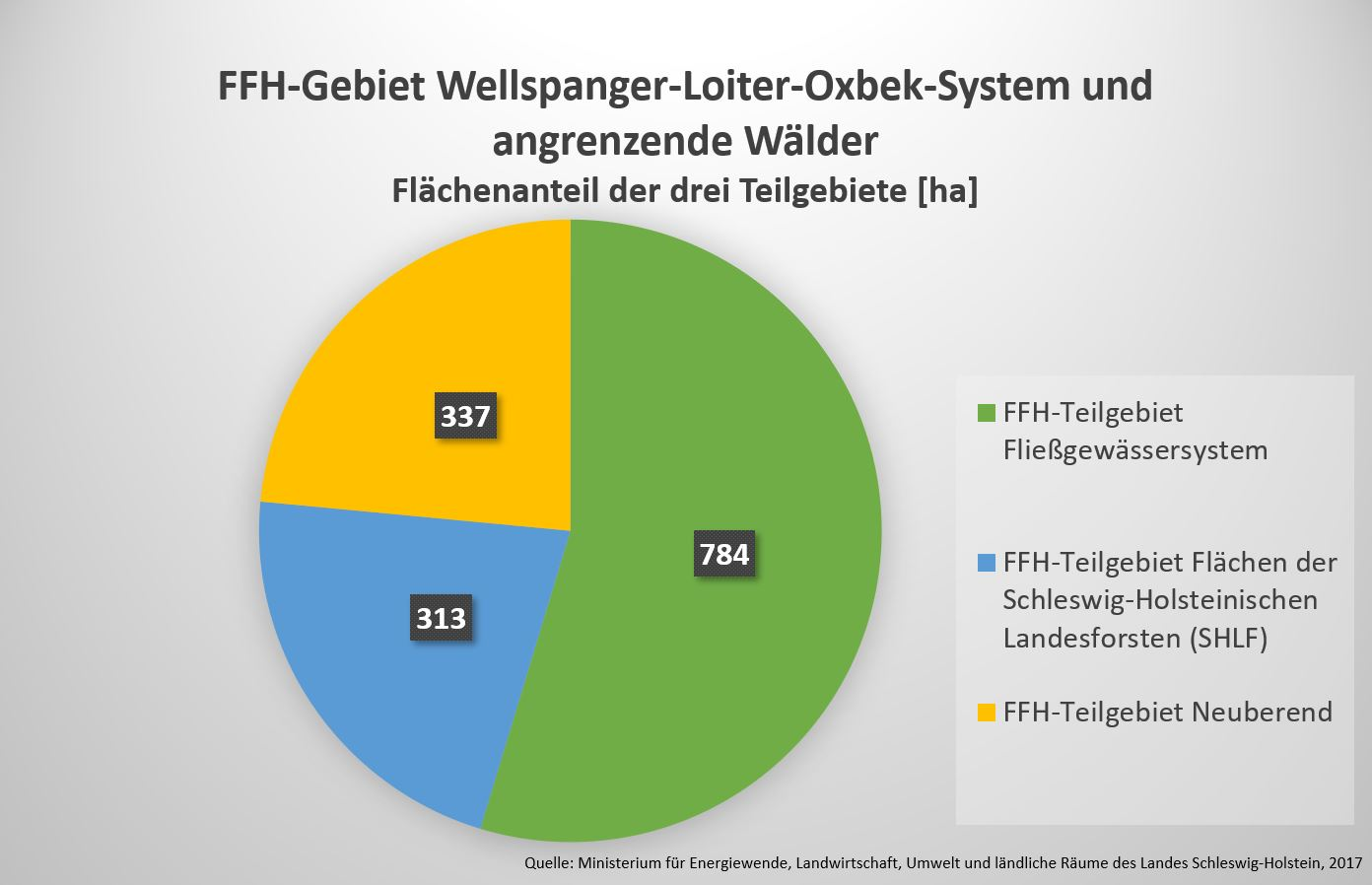 Diagramm Flächenanteile der Teilflächen an der Gesamtfläche